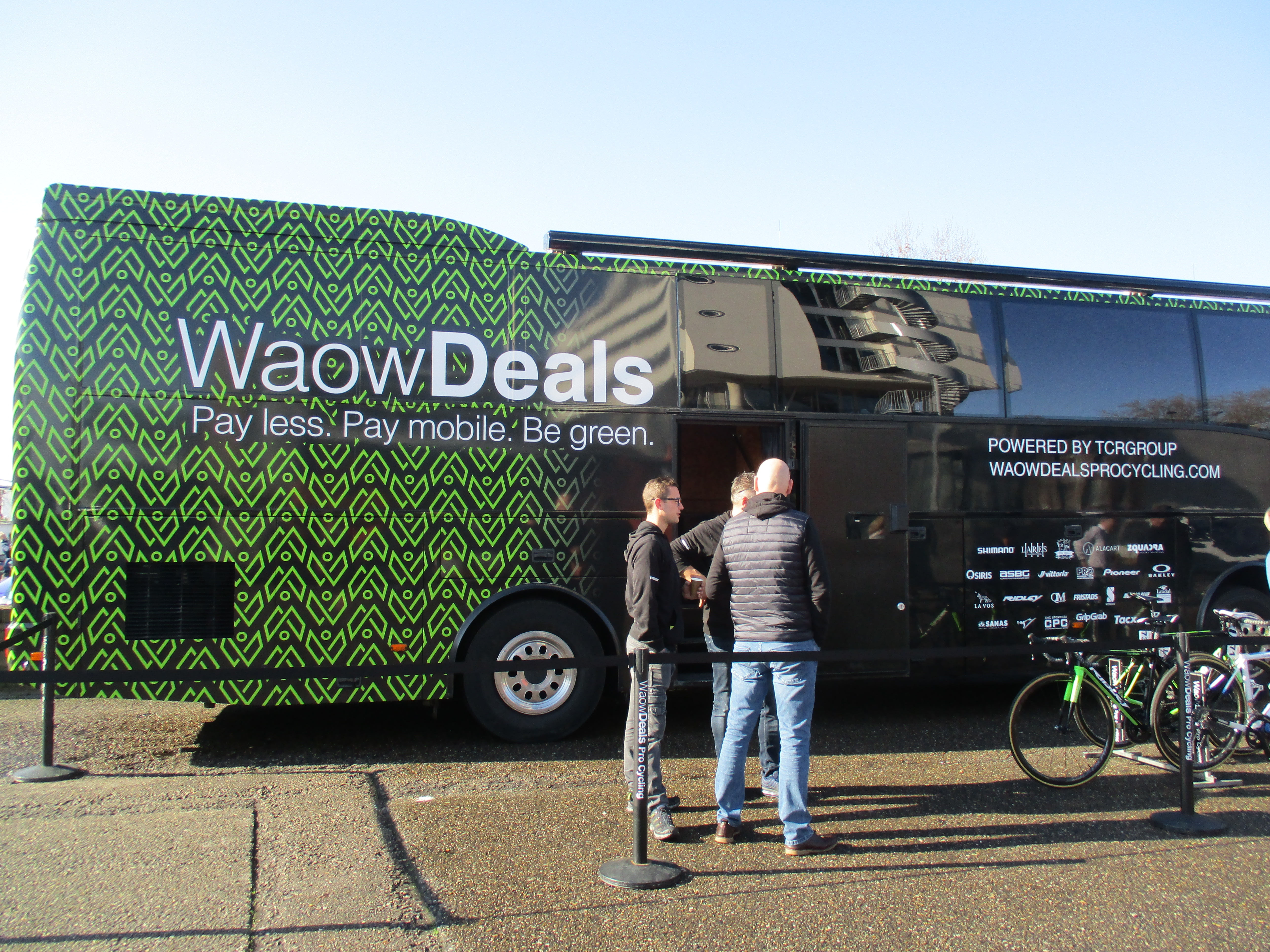 Start van de Amstel Gold Race Ladies Edition 2018 in Maastricht.